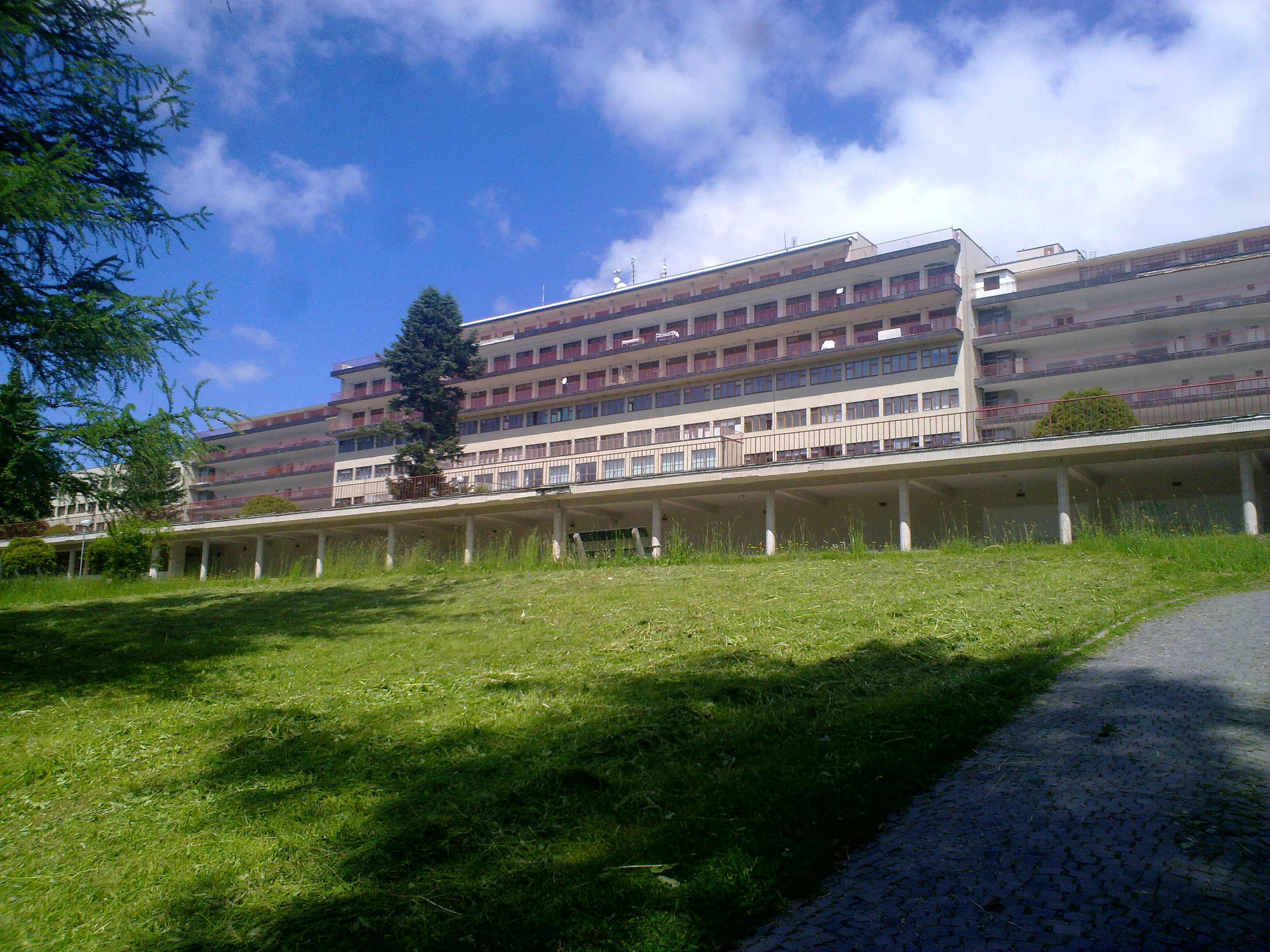 Hlavná budova Národného ústavu tuberkulózy, pľúcnych chorôb a hrudníkovej chirurgie vo Vyšných Hágoch